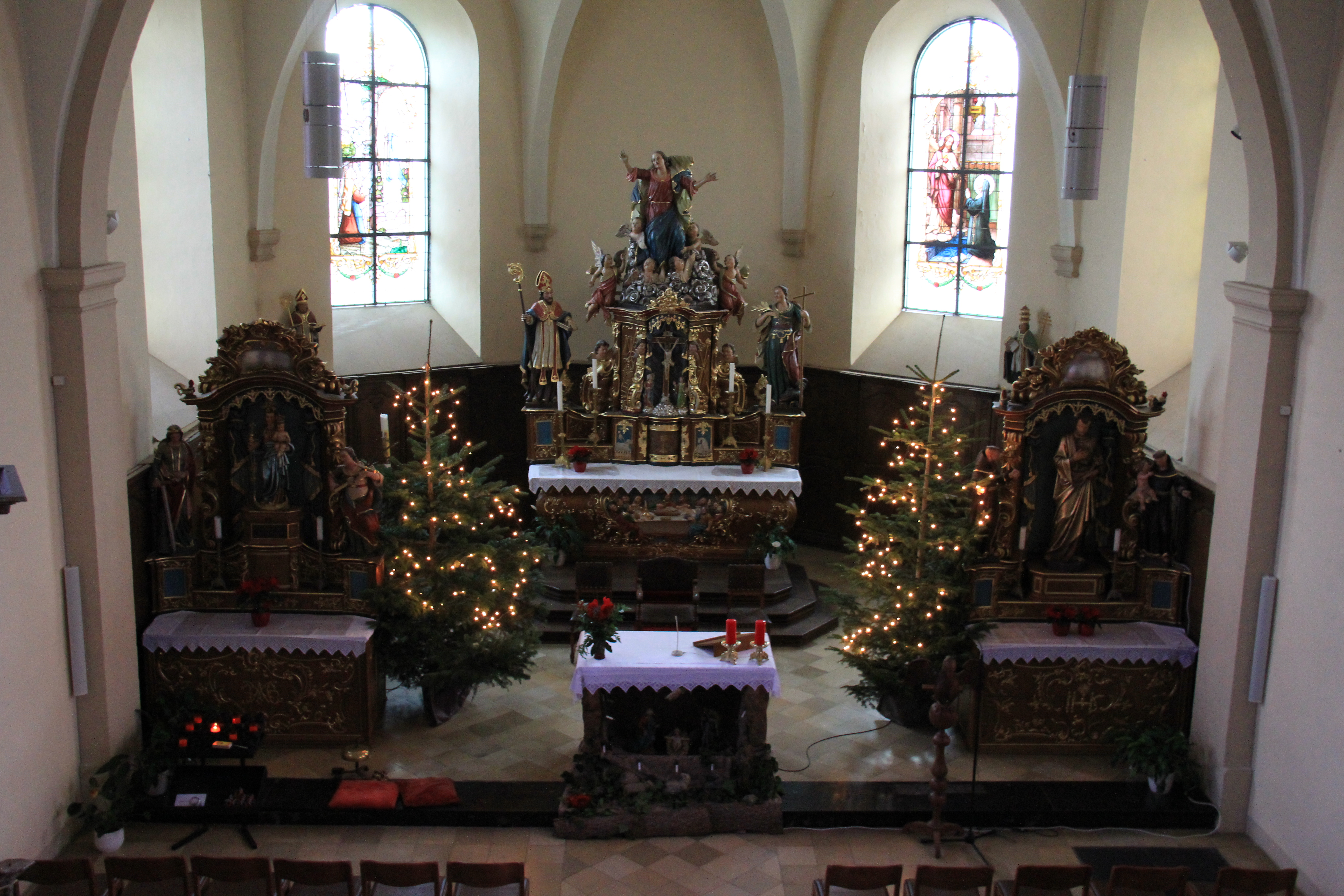 Den Haaptaltor an der Ielwener Parkierch (Gem. Biekerech), kuerz no Chrëschtdag.